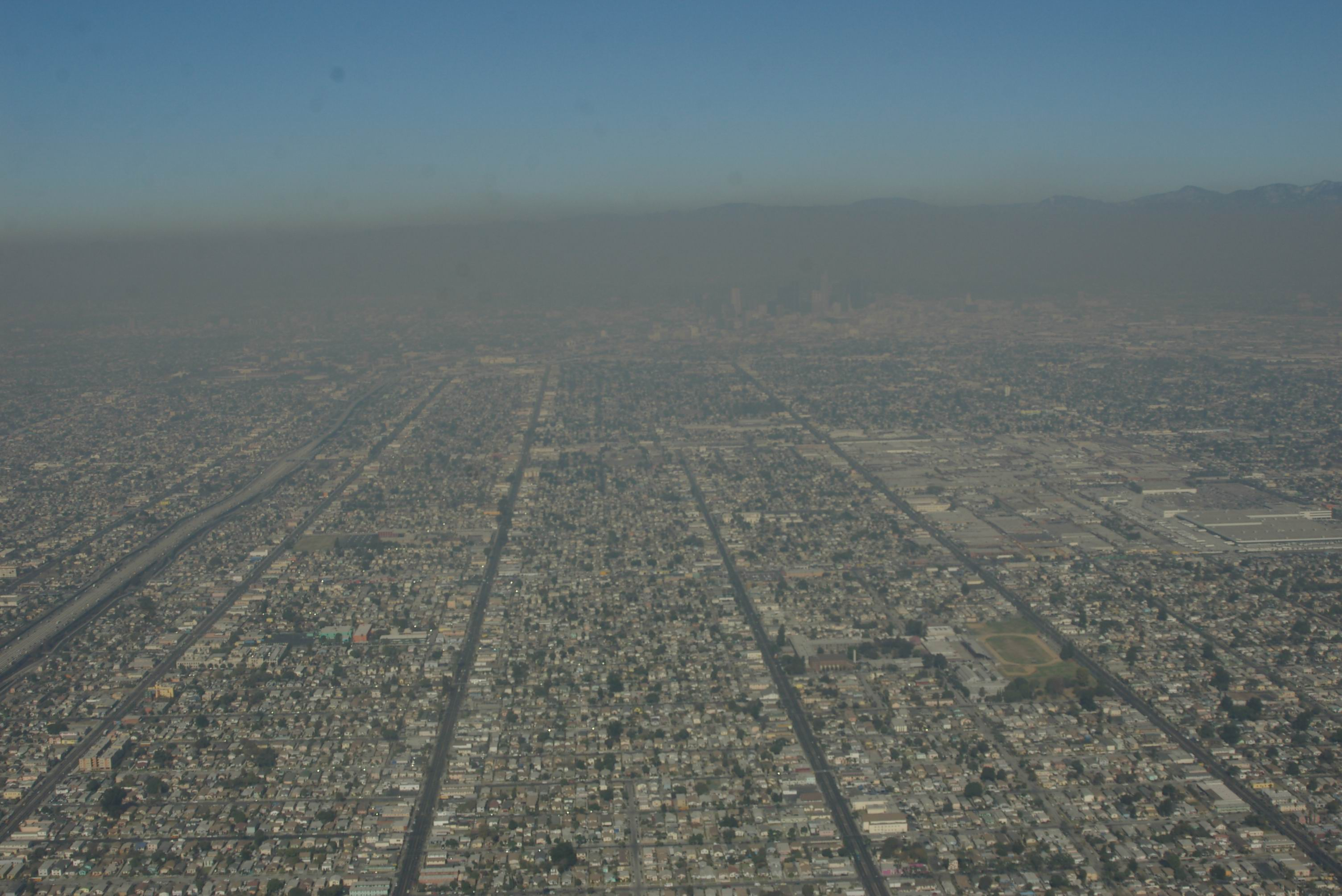 smog, Los Angeles Nov 2006